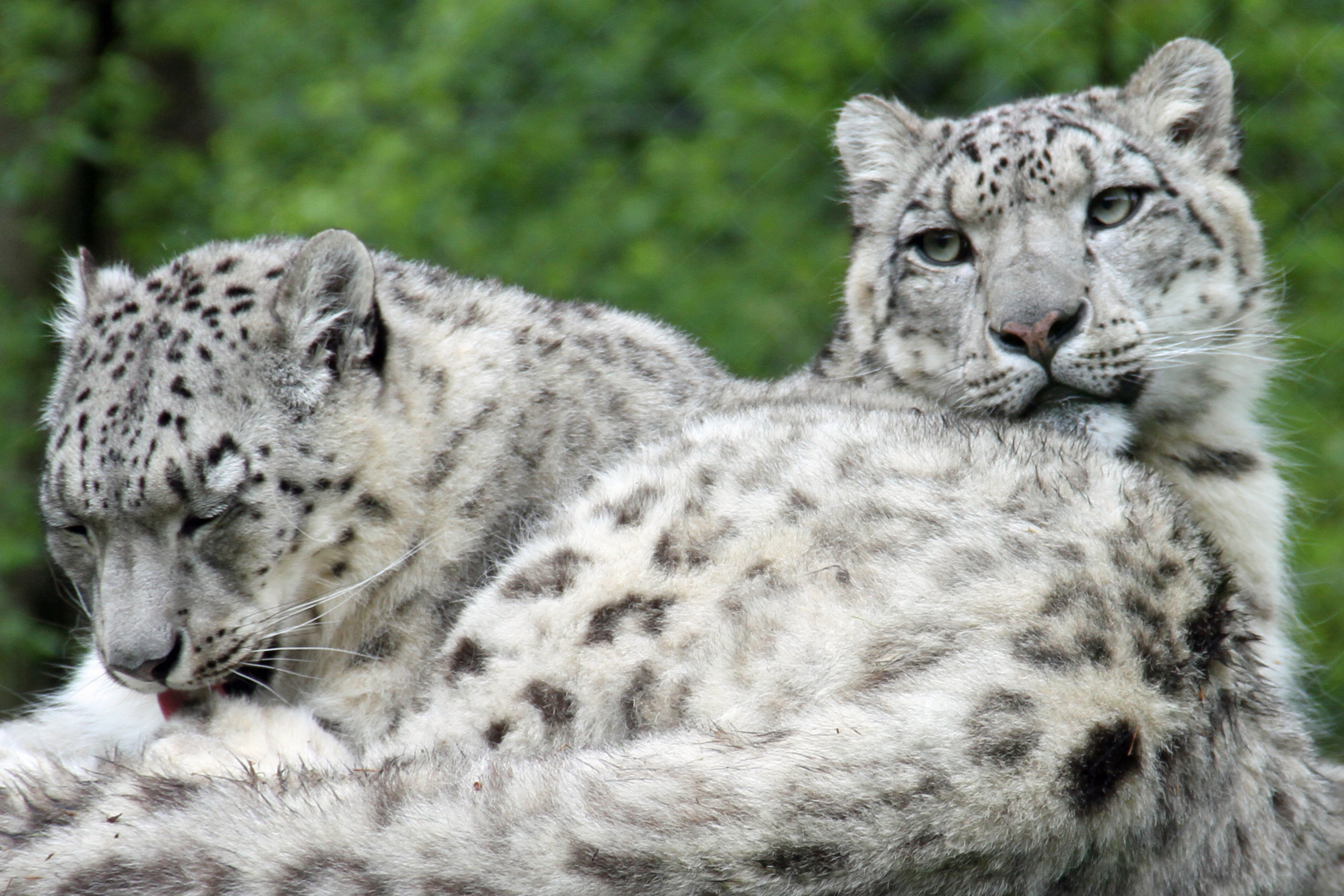 Couple de panthères des neiges